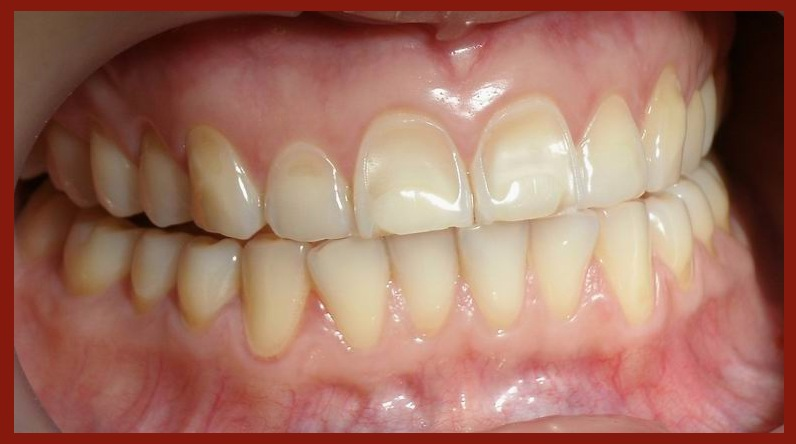 Некариозные поражения зубов. Пример зубной эрозии, яркий случай, связанный с гипоэстрогенией, фотография 2011 года, сделана в клинике во время работы над книгой: Г.Е.Соловьёва-Савоярова, "Эстрогены и некариозные поражения зубов".